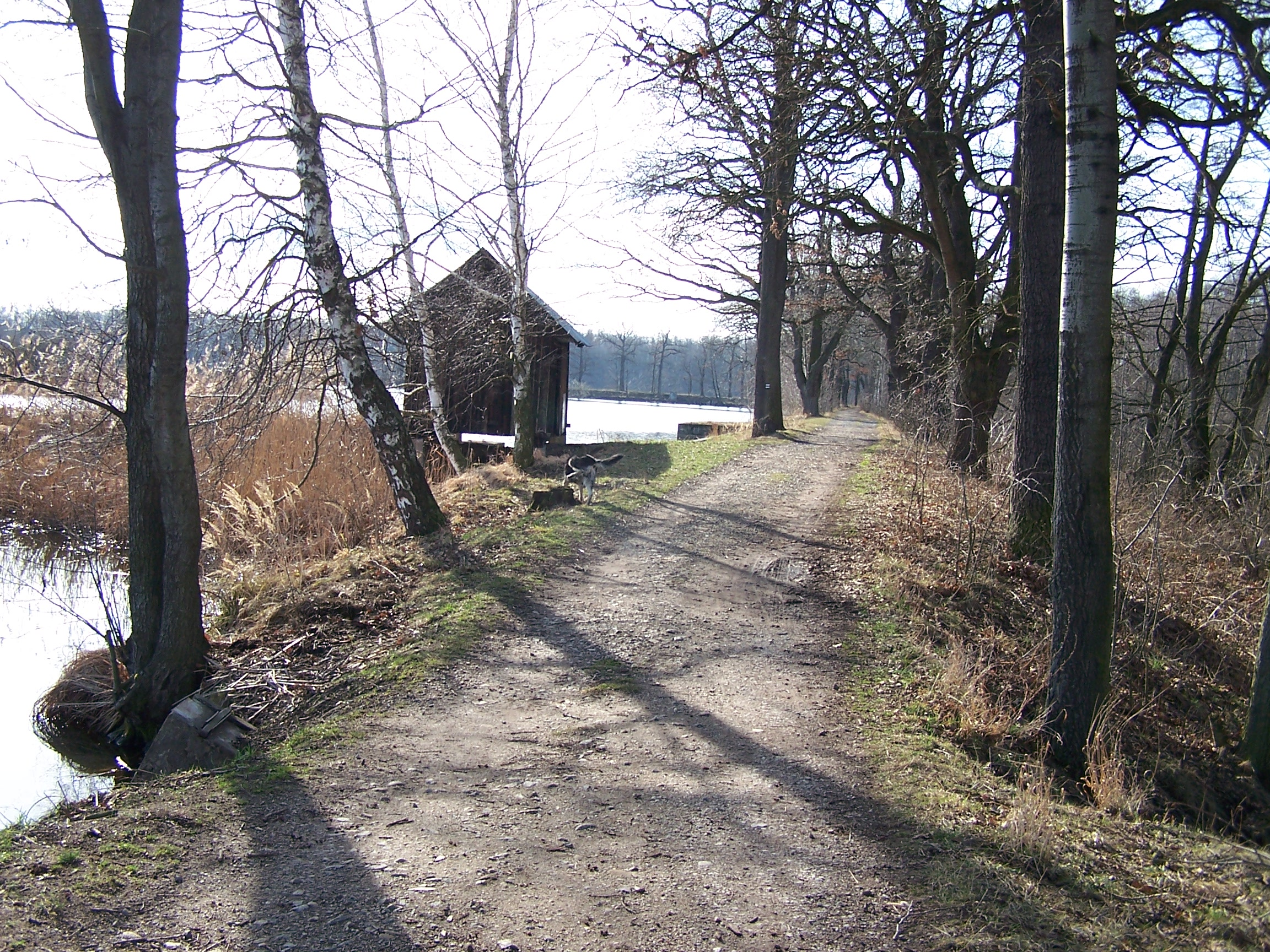 Pohled přes rybník Domin na Černiš